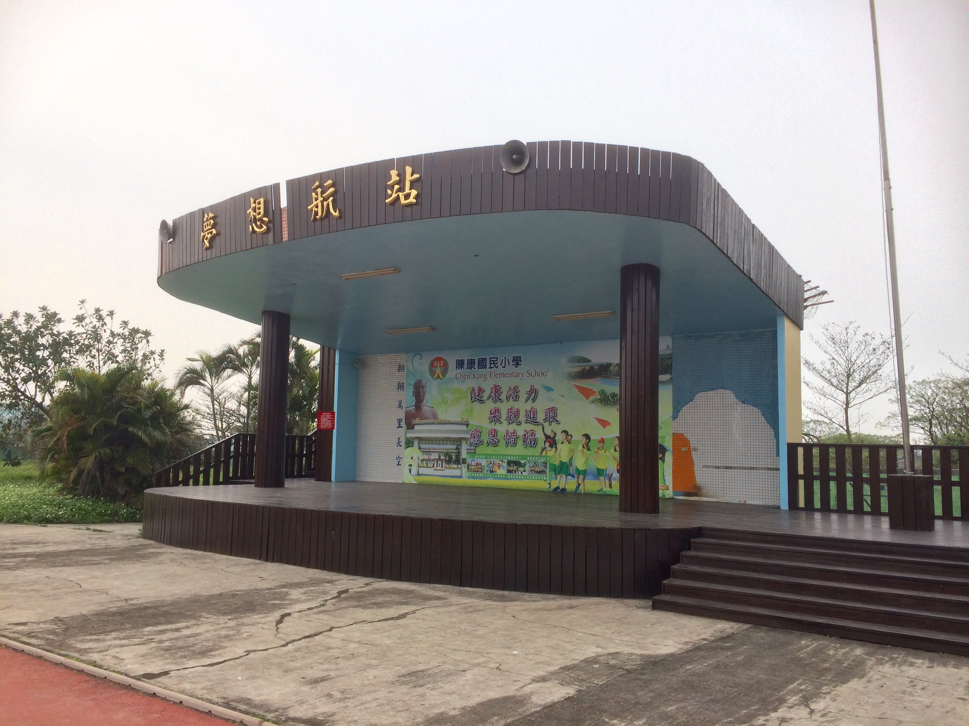 陳康國小司令台